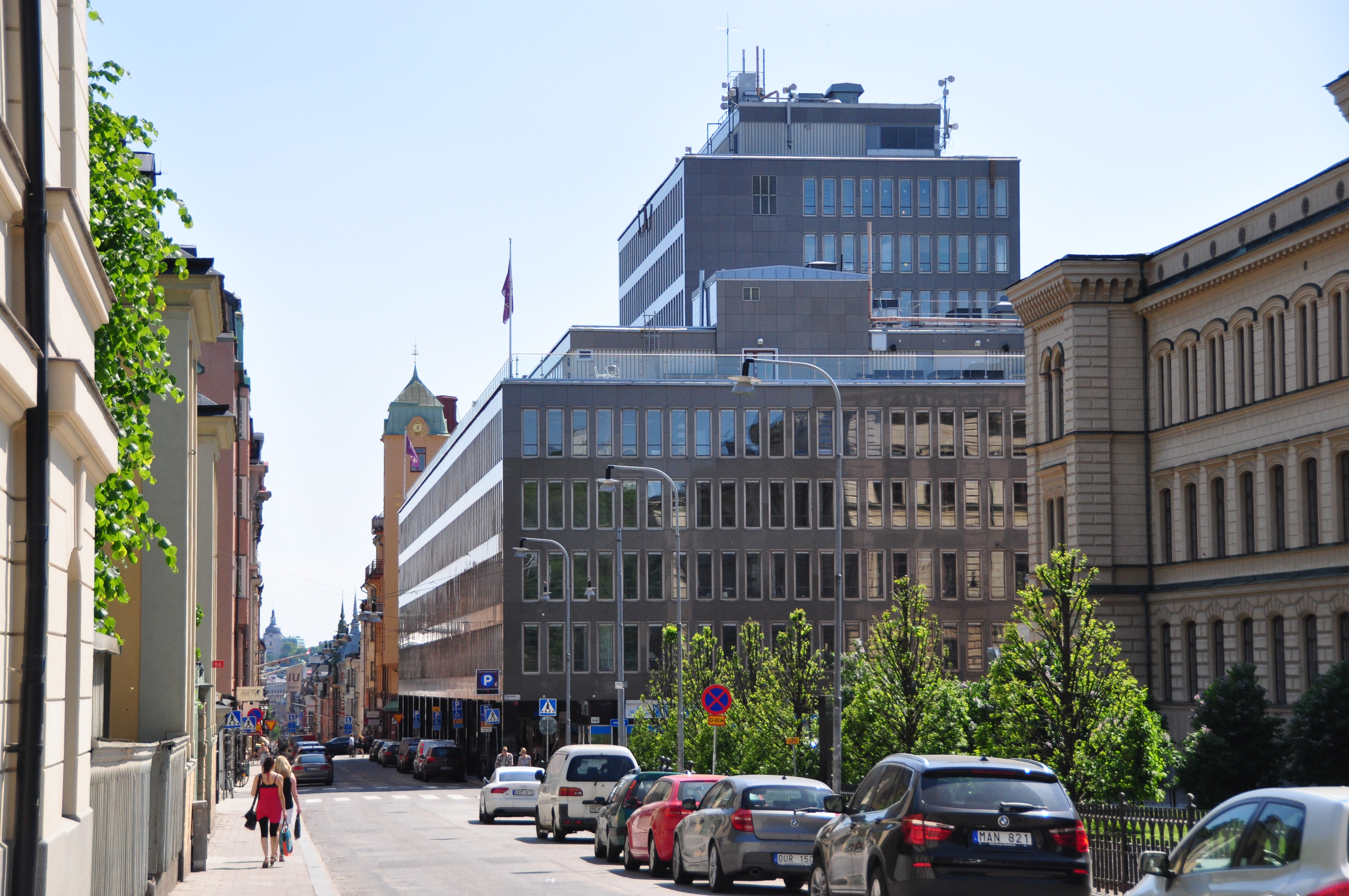 Barnhusväderkvarnen 36, Drottninggatan 87-93, Tegnergatan 32, Byggnadsår 1961-63, arkitekt Folke Löfströms Arkitektkontor AB, byggherre AB Samuelsson & Bonnier. Byggt för Postbanken